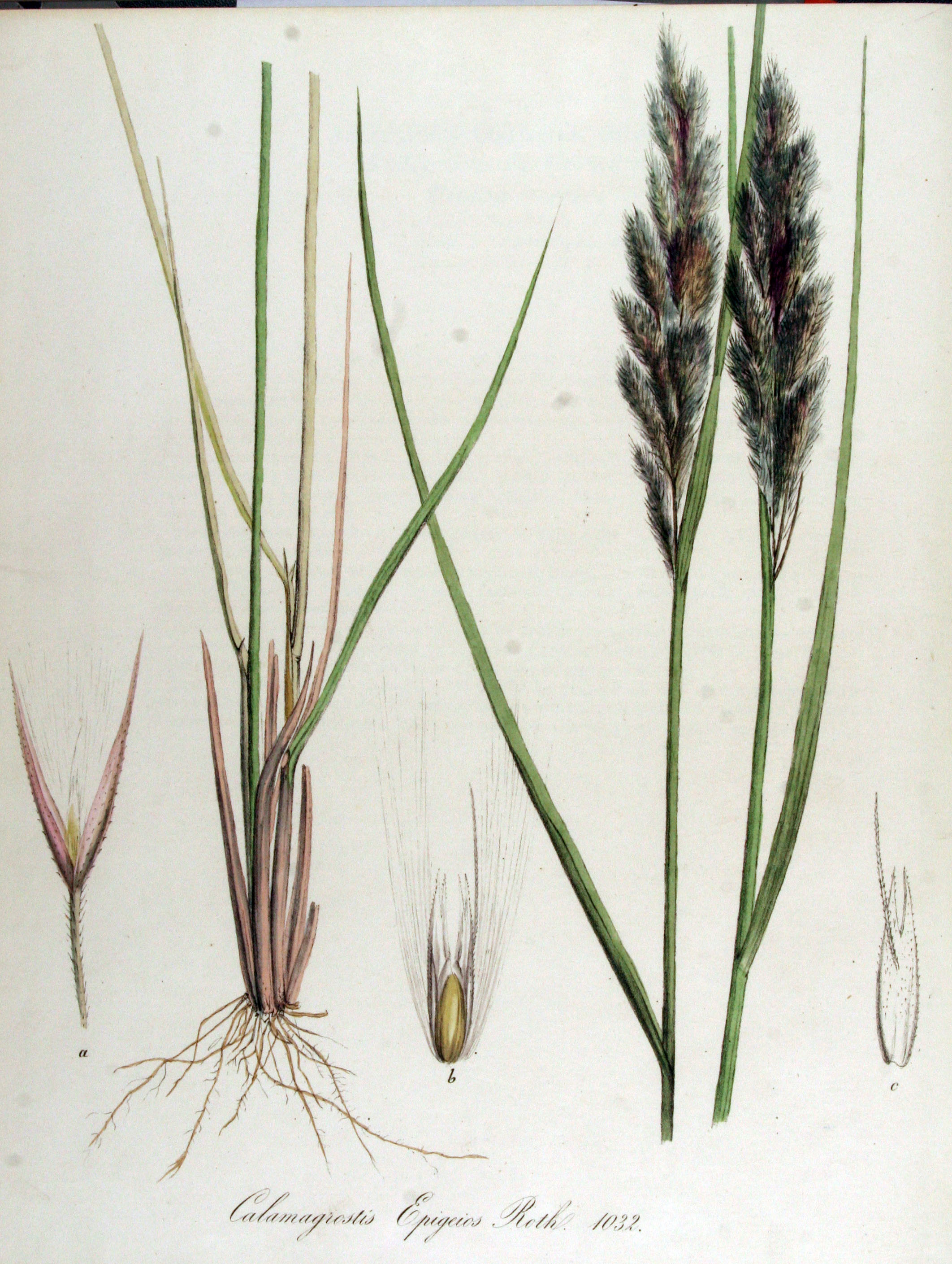 Calamagrostis epigeios (L.) Roth